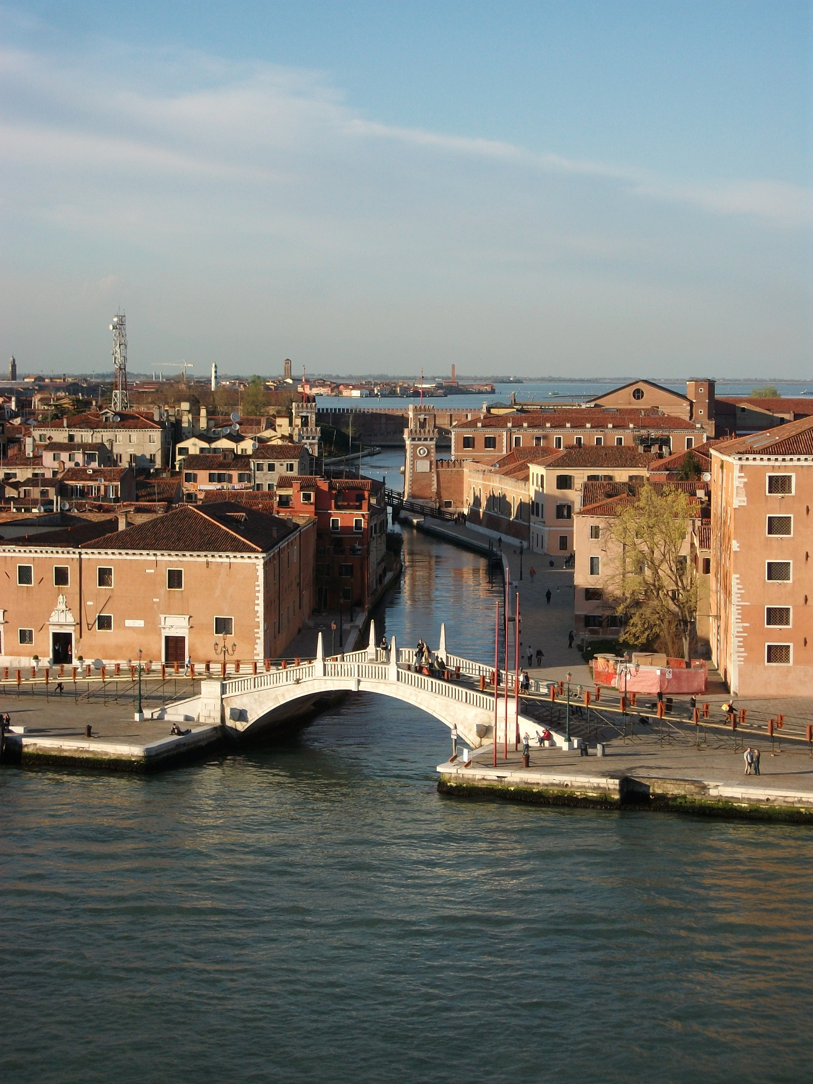 Ponte San Biasio delle Catene i Rio dell'Arsenale, Venècia.